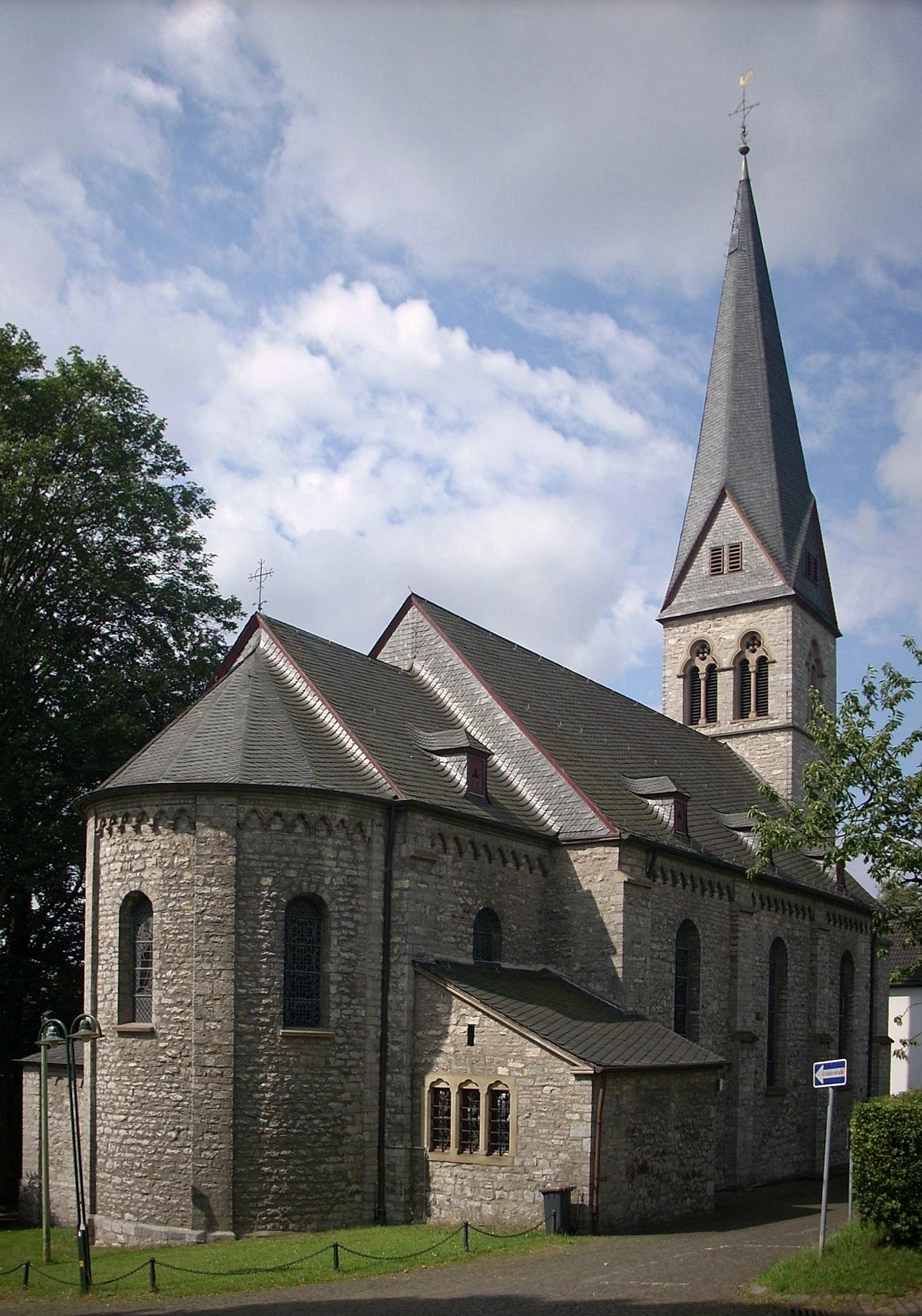 Haan-Gruiten, Kath. Kirche St. Nikolaus